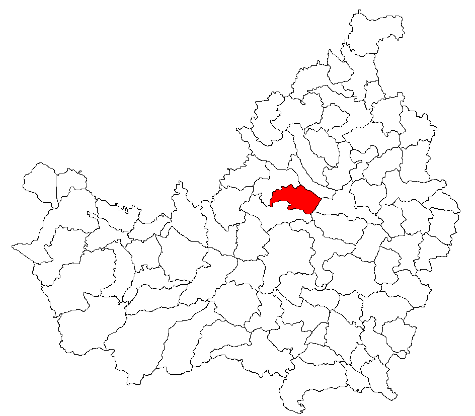 Categorie:Hărţi ale judeţului Cluj